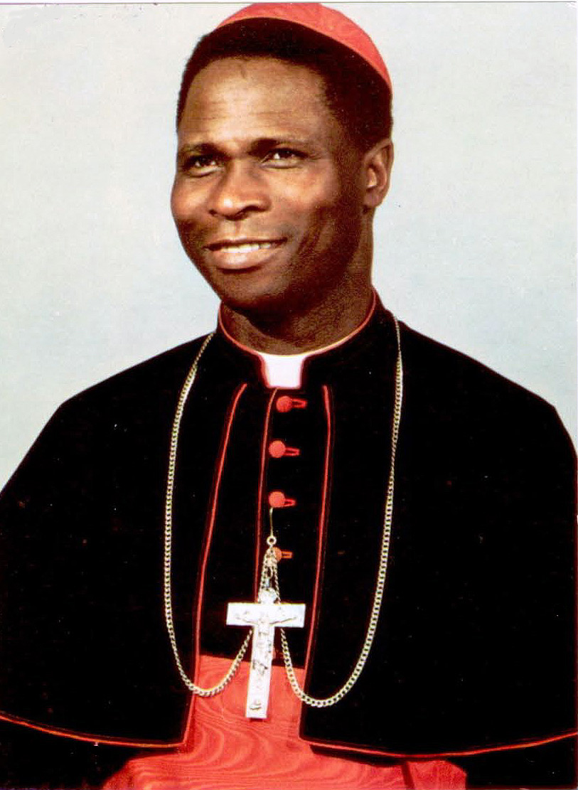 Kardinal Bernadin Gantin